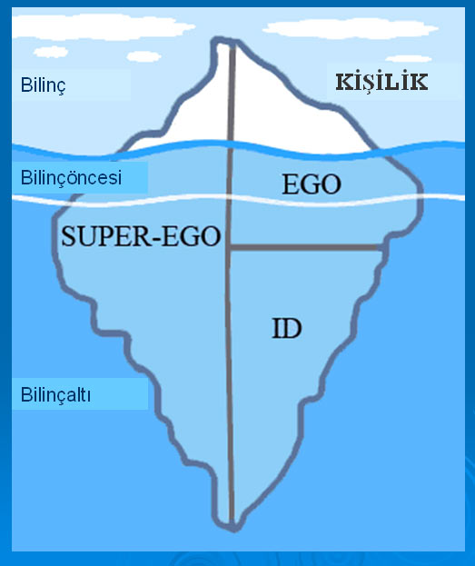 Bilincin temellerini açıklayan bir şema. İngilizce Ego maddesinden alınarak Türkçeleştirilmiştir. Süleyman SÖNMEZ Kaynak: İngilizce Wikipedia